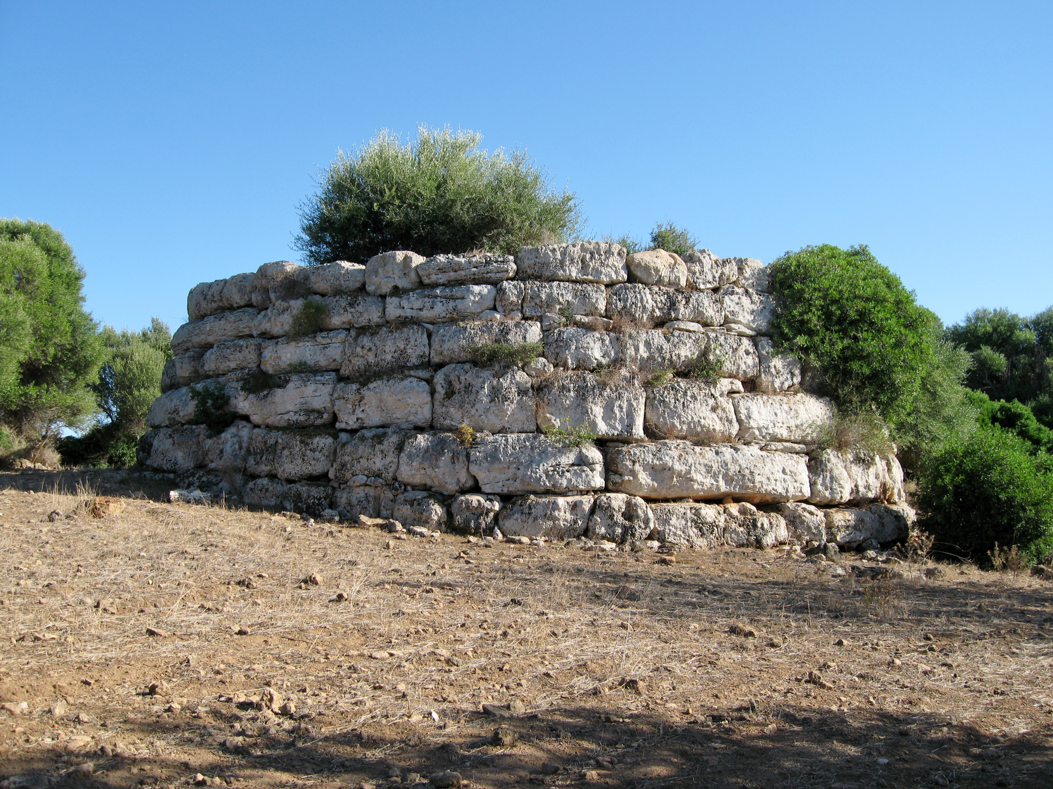 Runder Talayot sa Clova des Xot (Talaiot de sa Canova) auf dem Landgut sa Canova de Morell in der Gemeinde Artà, Mallorca, Spanien